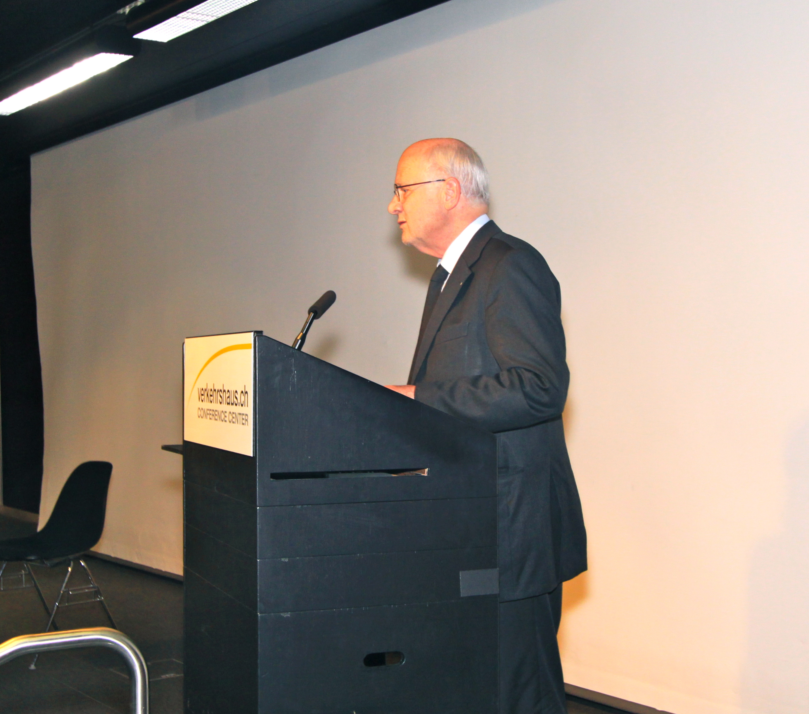 Sie dürfen das Foto mit Nennung des Autors honorarfrei vervielfältigen, verbreiten und öffentlich zugänglich machen. Foto: Jürg Vollmer / Infos